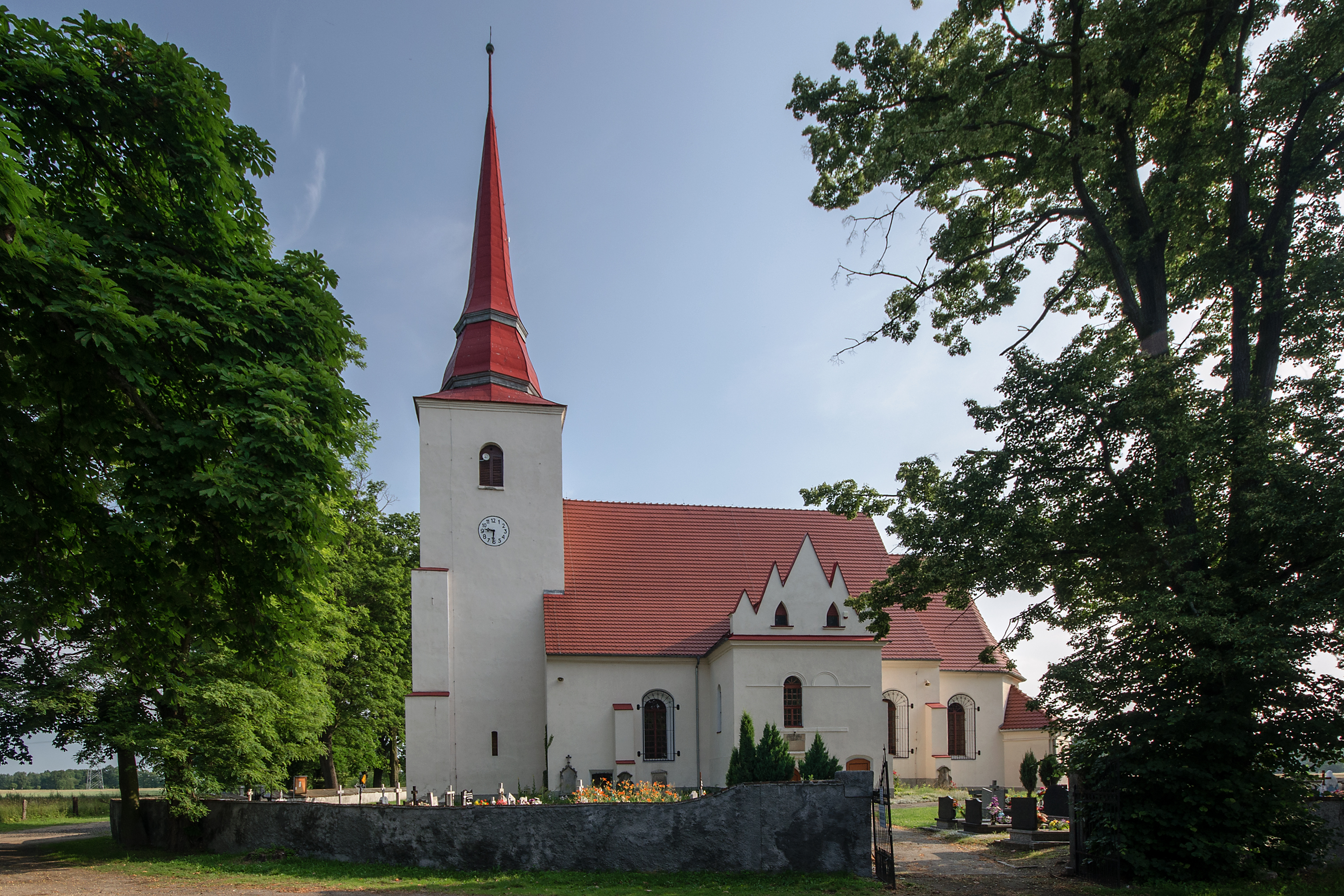 Zamienice, kościół fil. p.w. Wniebowzięcia NMP, XIV, 1617, 2 poł. XIX